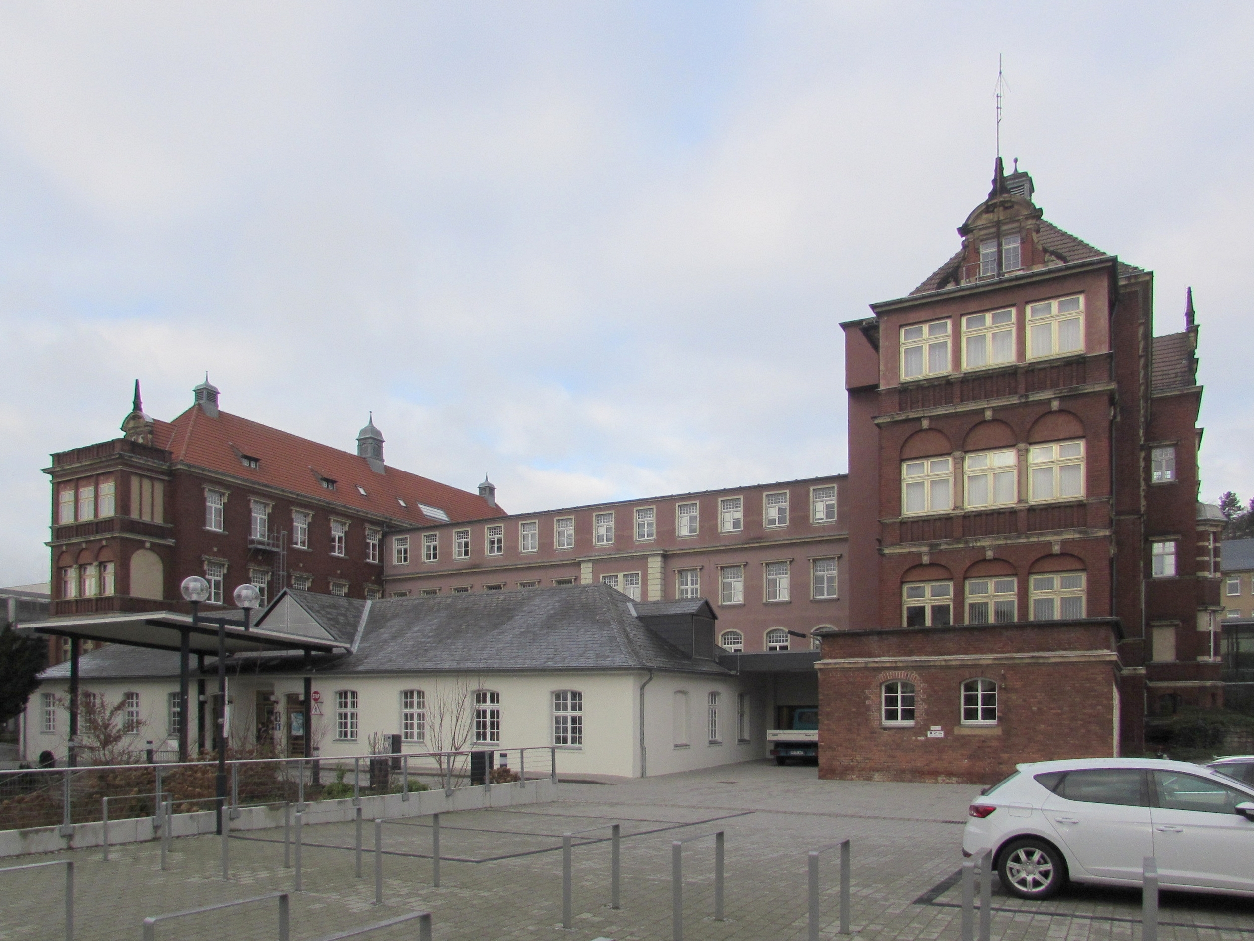 hauptgebäude klinikum bbrandenburg